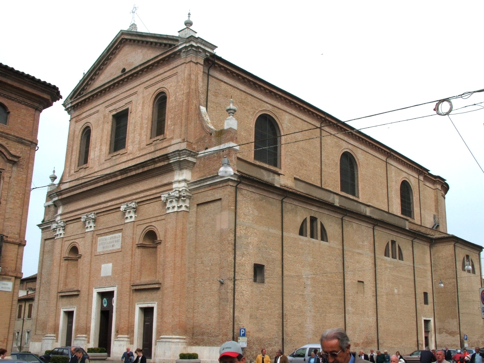 Comacchio, Emilia Romagna, Italia cattedrale